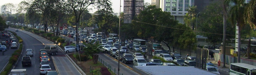 Gridlock in Kuningan Jakarta